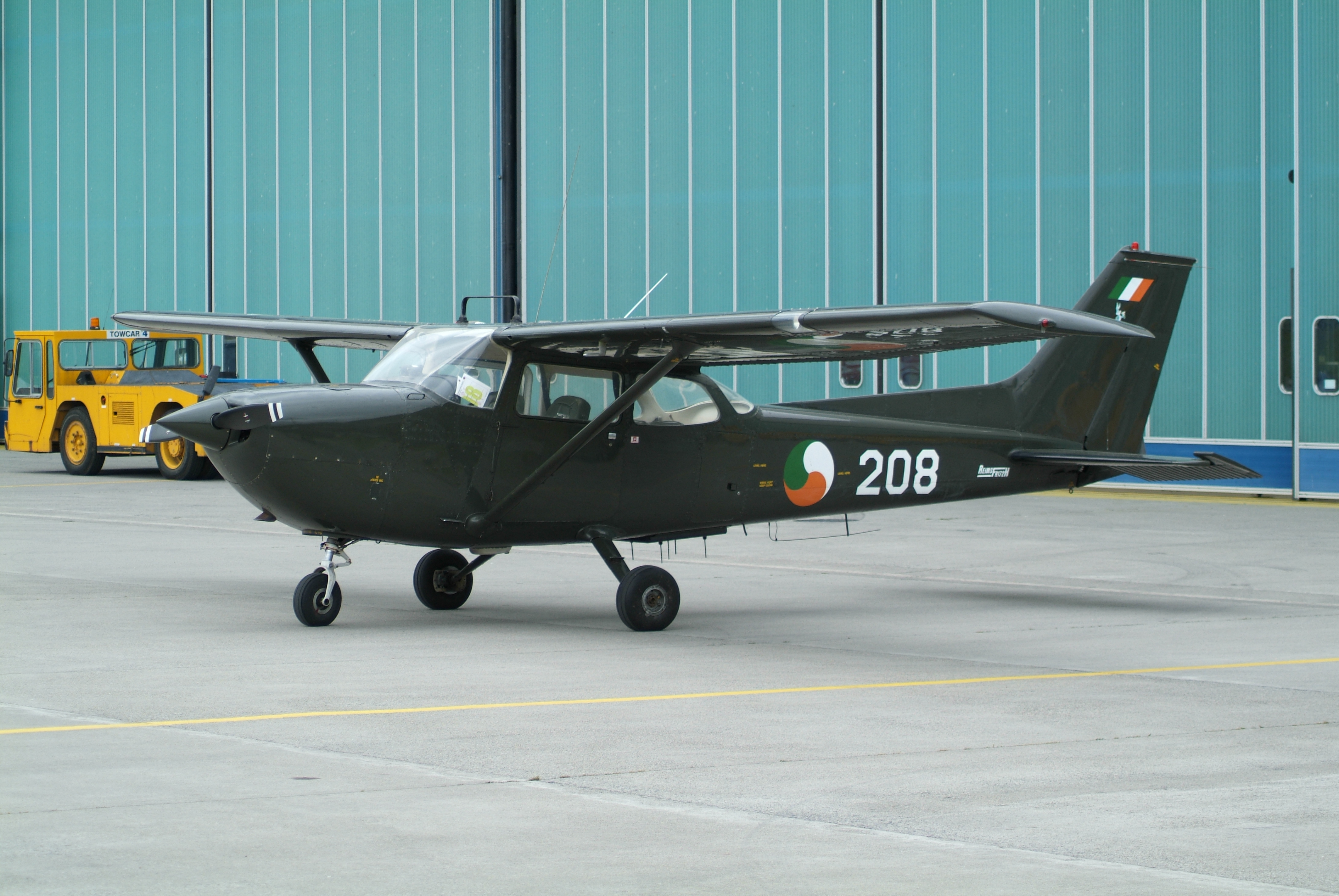 Reims FR.172H Rocket